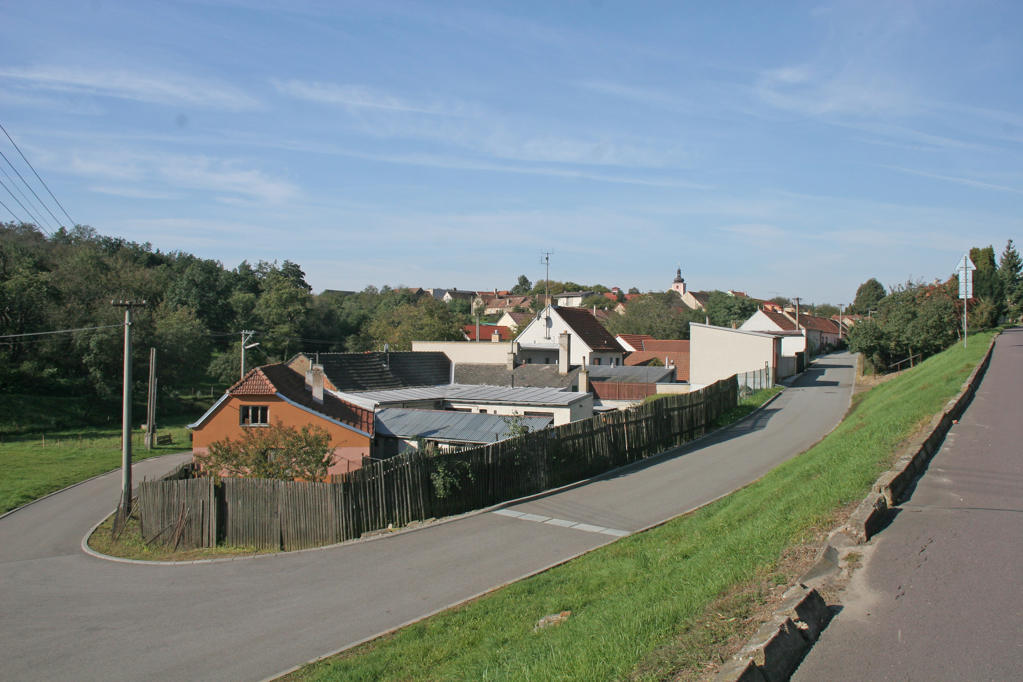 Mašovice čp. 134